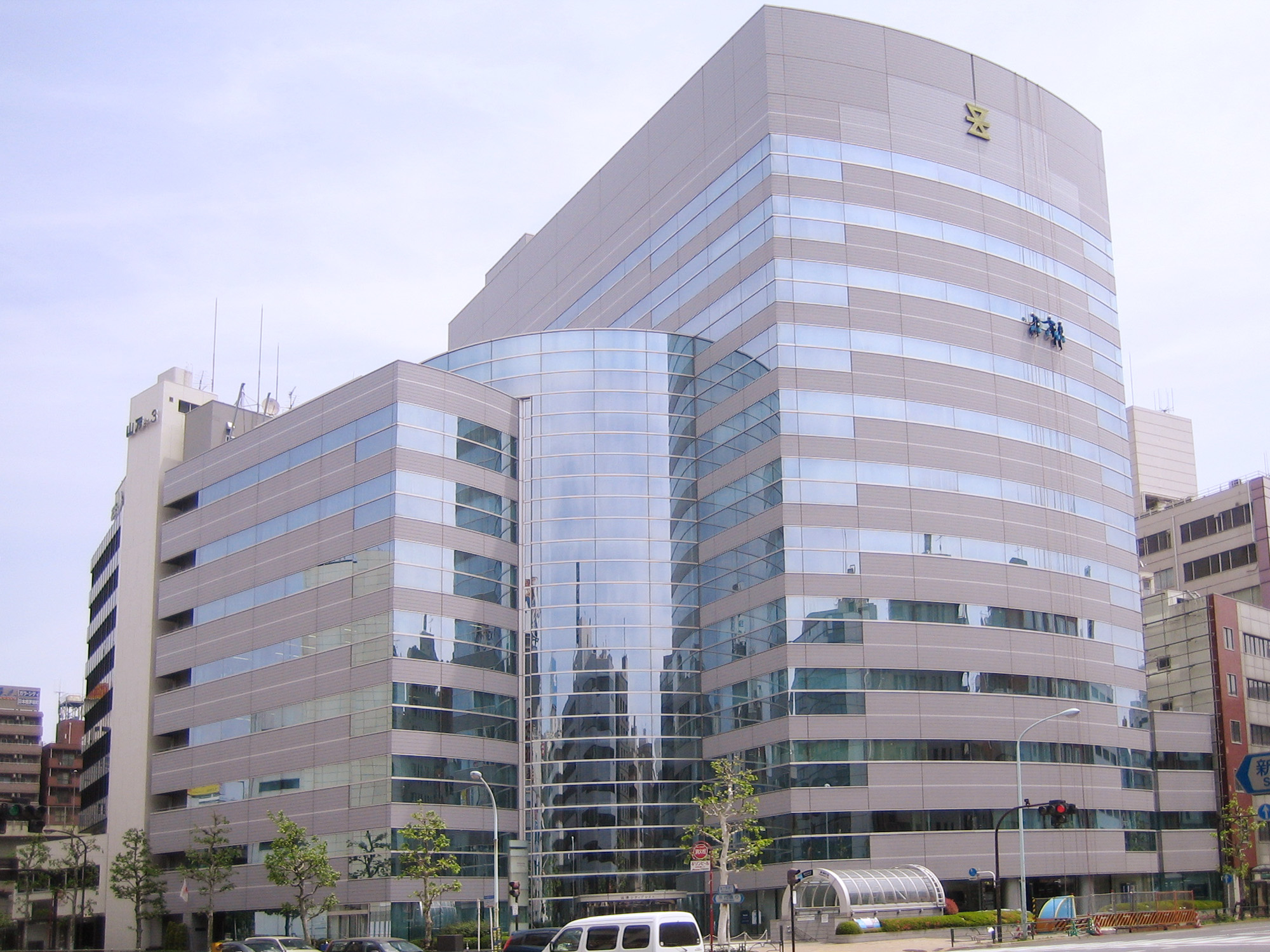 Shibusawa Warehouse Co., Ltd. (澁澤倉庫株式会社 Shibusawa Sōko), in Chuo, Tokyo, Japan